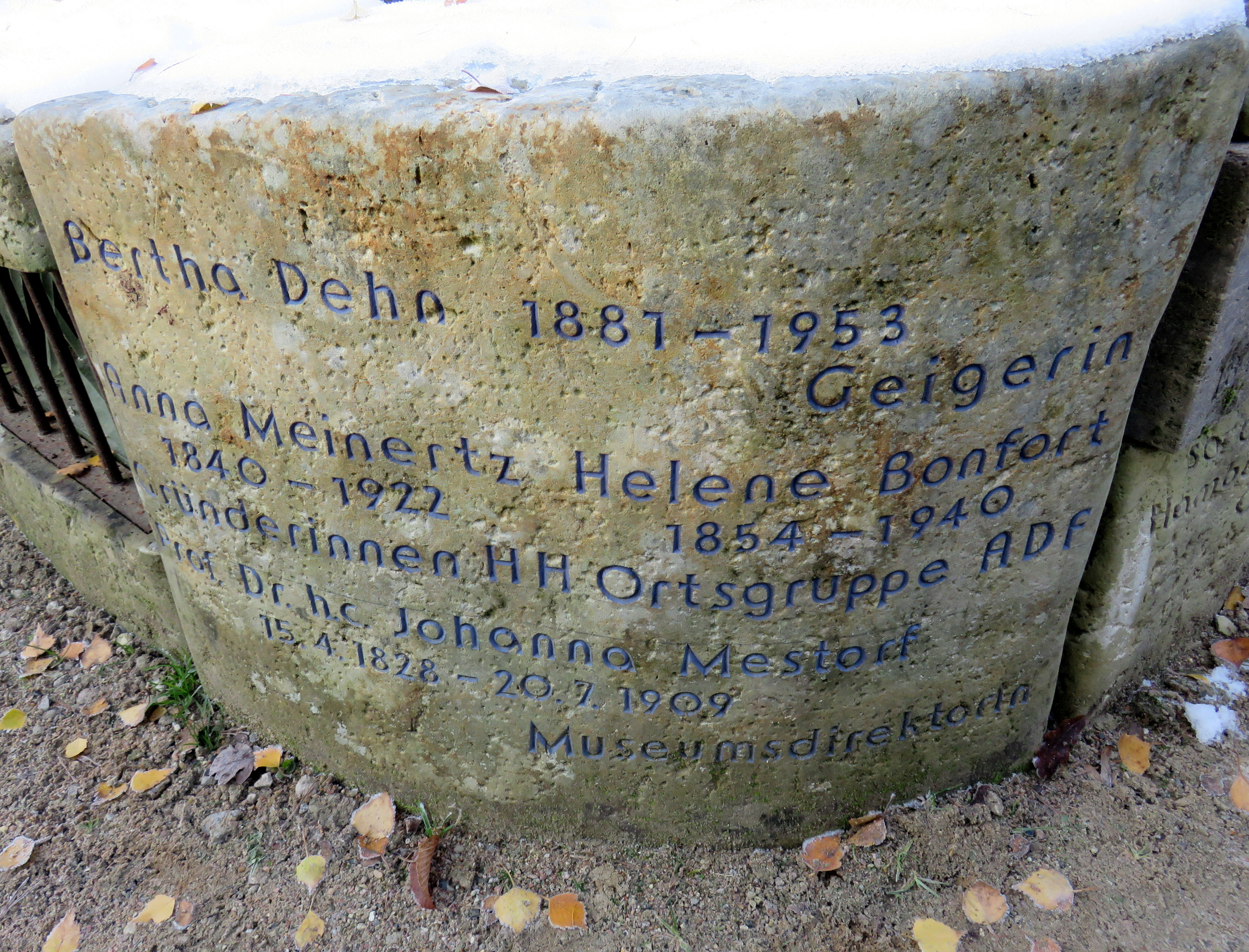 Gedenkstein für Bertha Dehn, Anna Meinertz, Helene Bonfort sowie Johanna Mestorf in der Erinnerungsspirale im Bereich des Gartens der Frauen auf dem Ohlsdorfer Friedhof in Hamburg-Ohlsdorf.